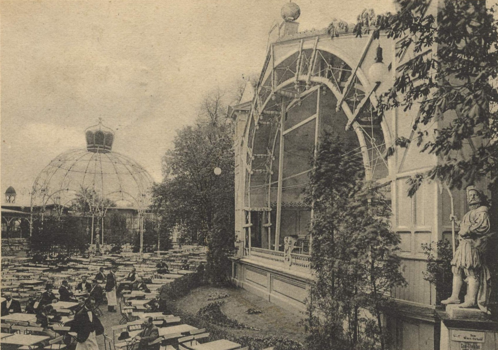 Musikpavillon im "Weltetablissement Weißensee"